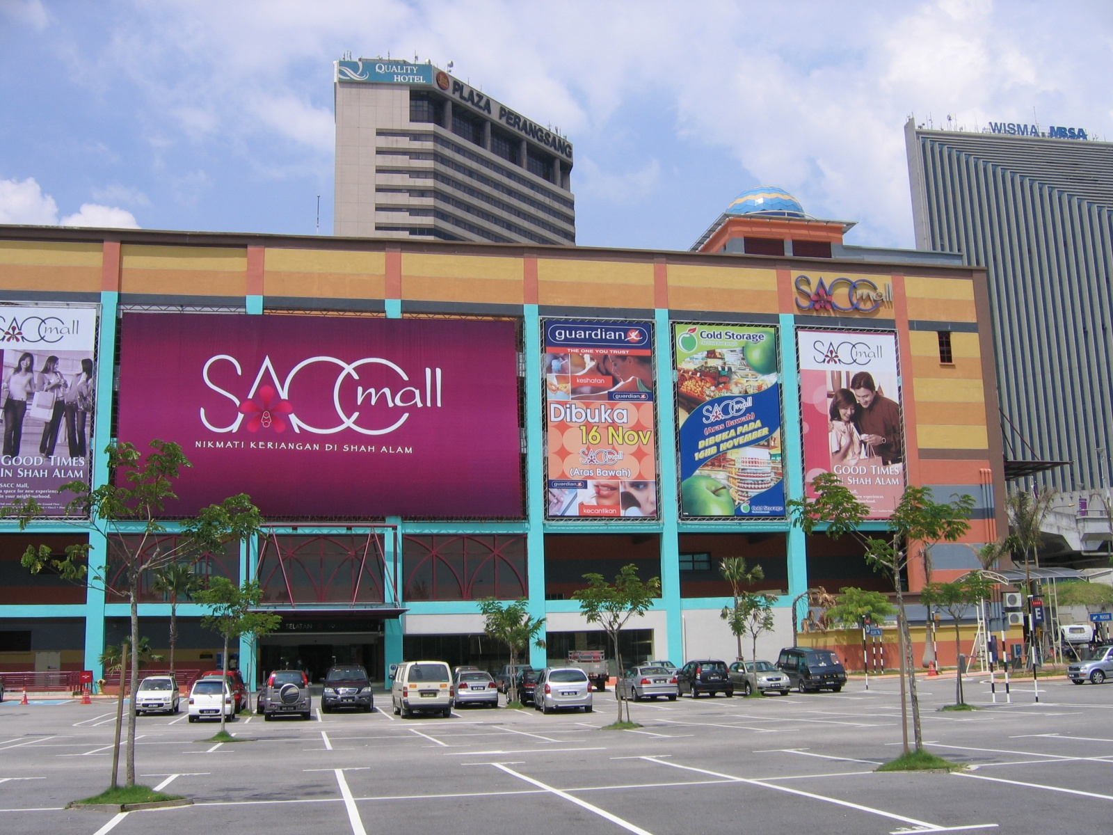 SACC Mall in Shah Alam, Selangor, Malaysia